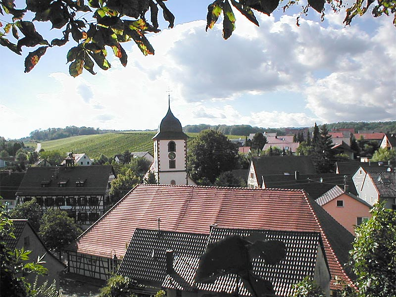 Blick über Neipperg: links das alte Rathaus, daneben die evangelische Katharinenkirche, im Vordergrund die Kelter.